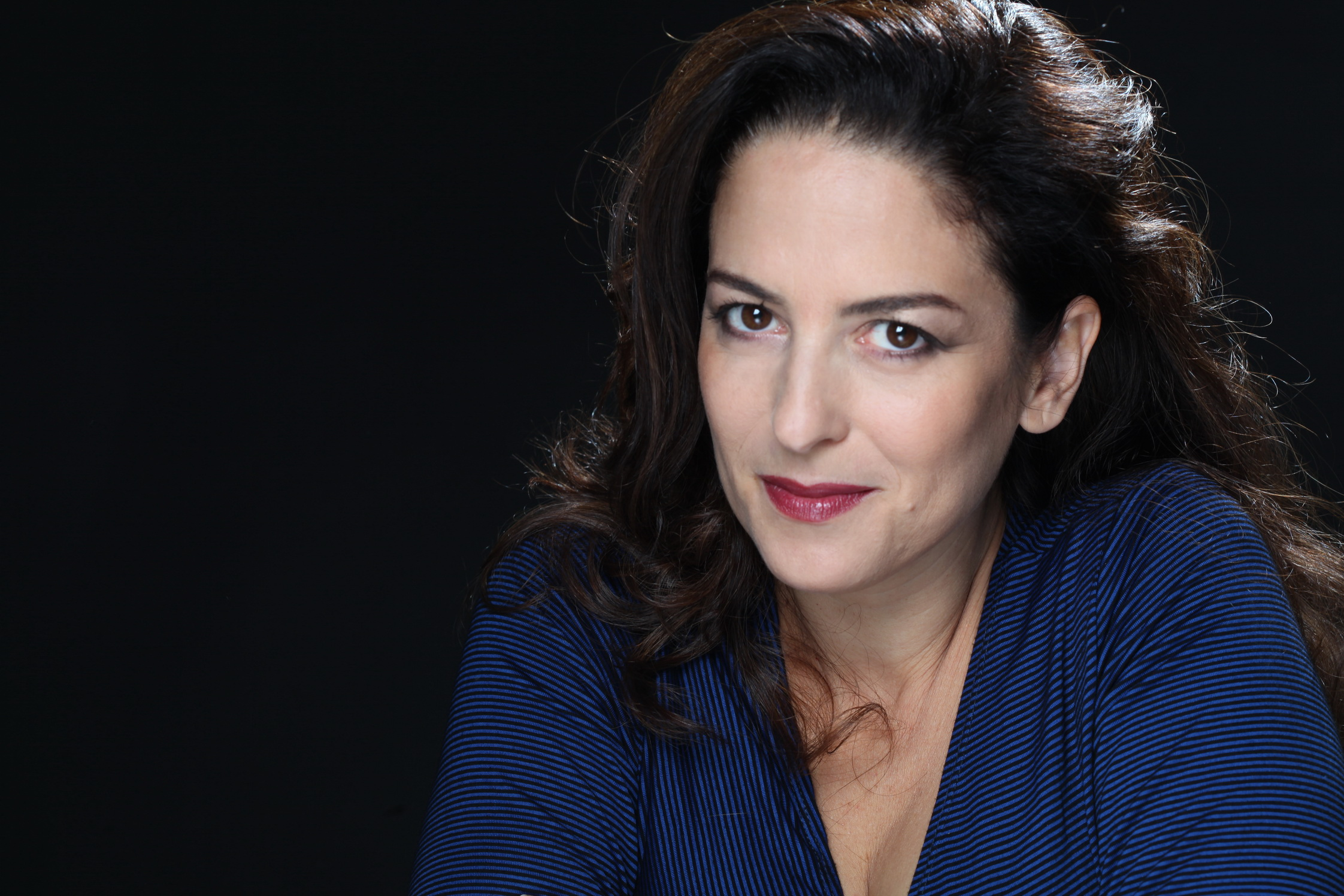 אמונה צבי לשם